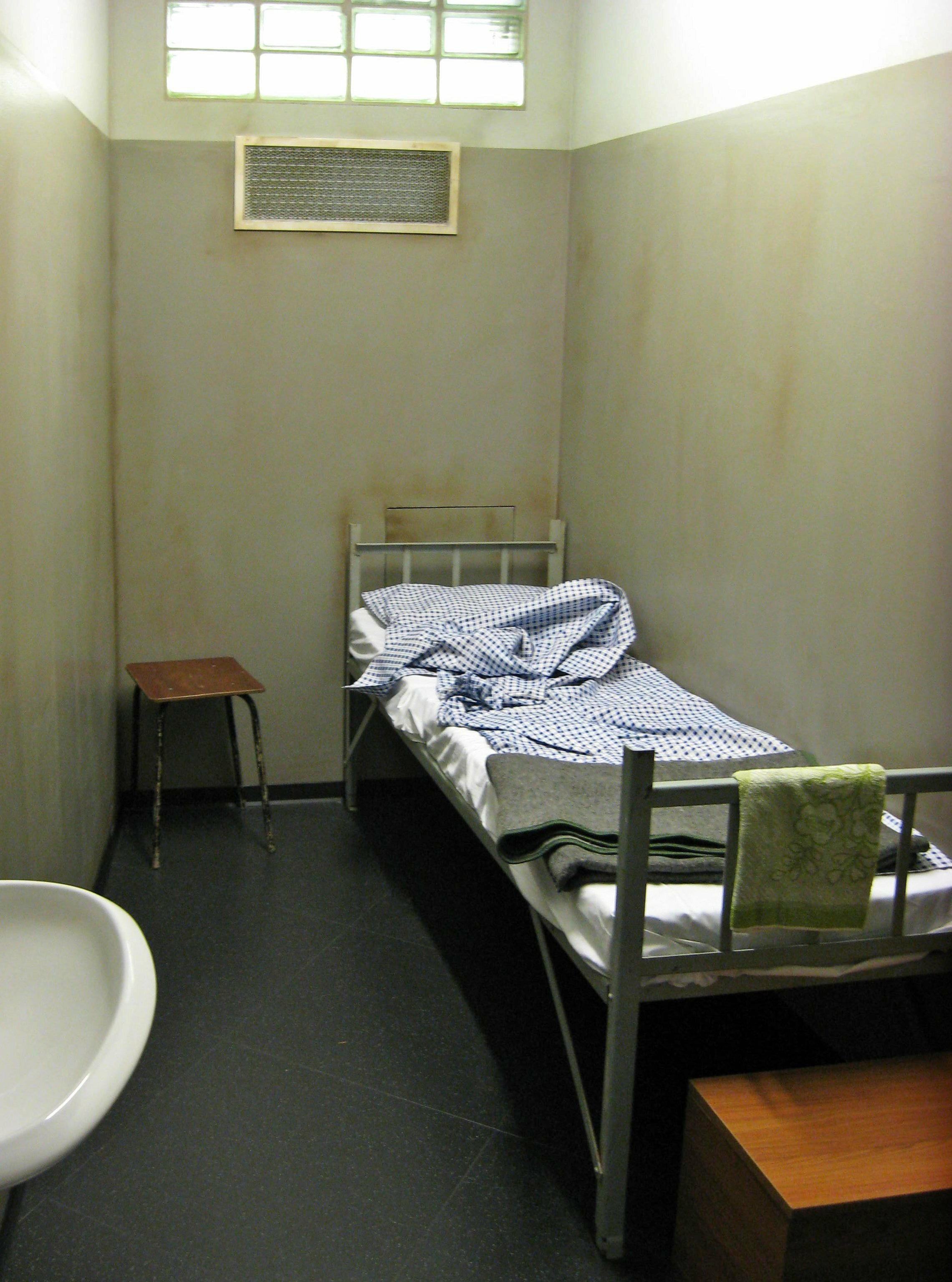 Typische DDR Gefängniszelle, DDR-Museum Berlin